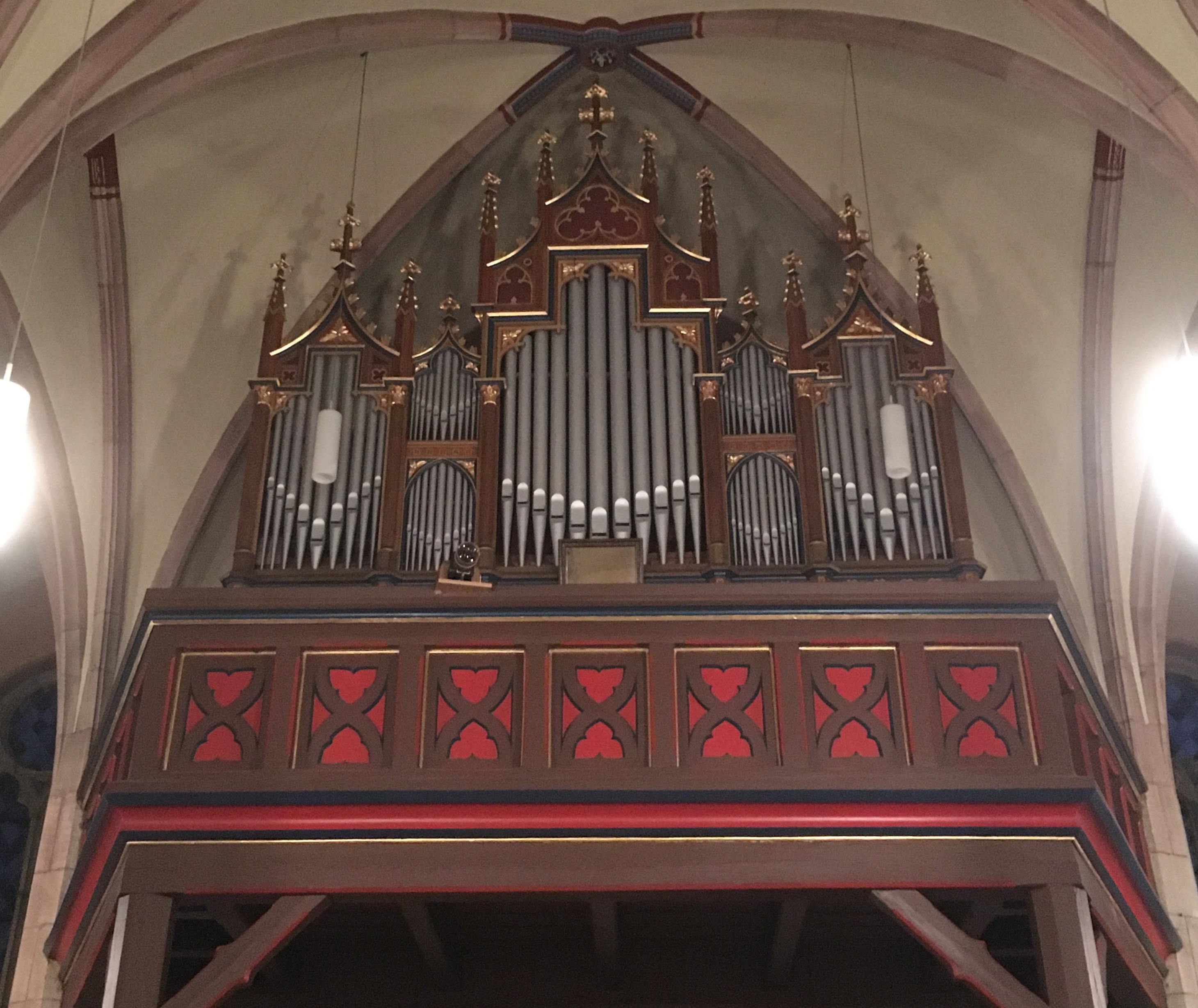 Das Orgelprospekt der 1879 erbauten Krell-Orgel in der katholischen St. Peter und Paul-Kirche in Bernshausen (Seeburg)